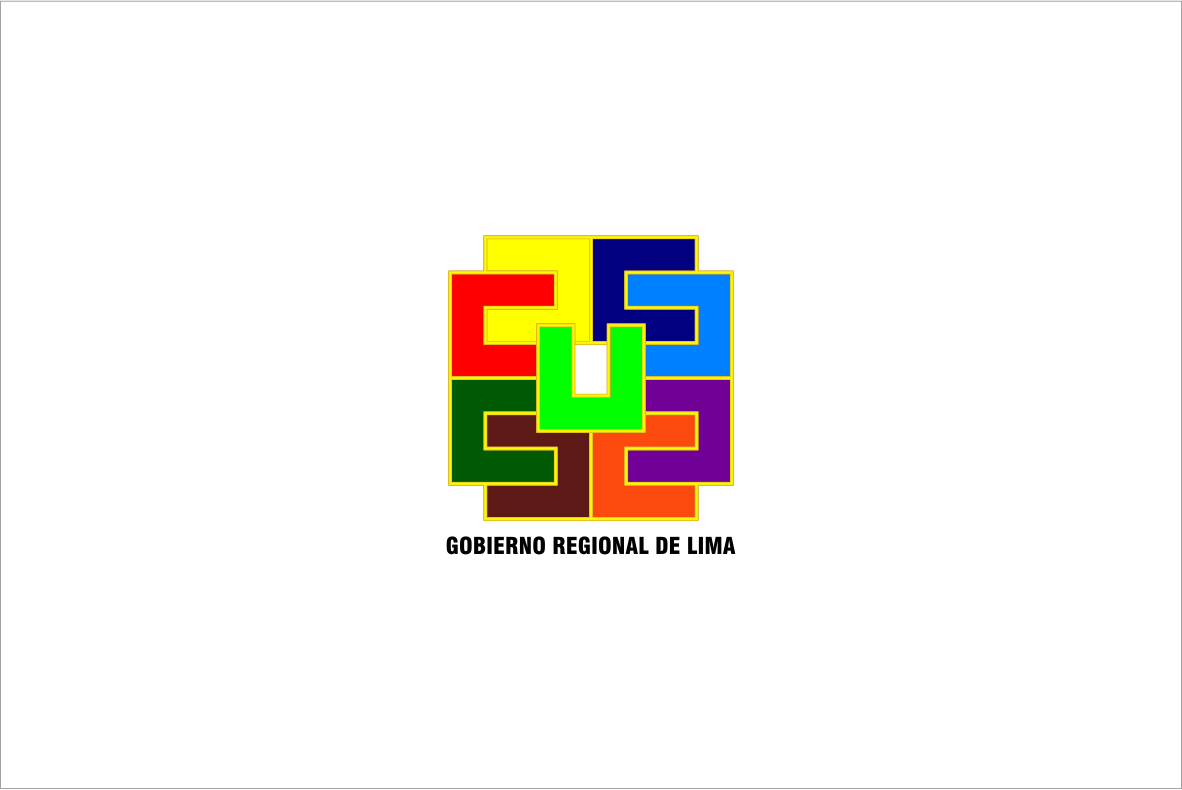 Región Lima